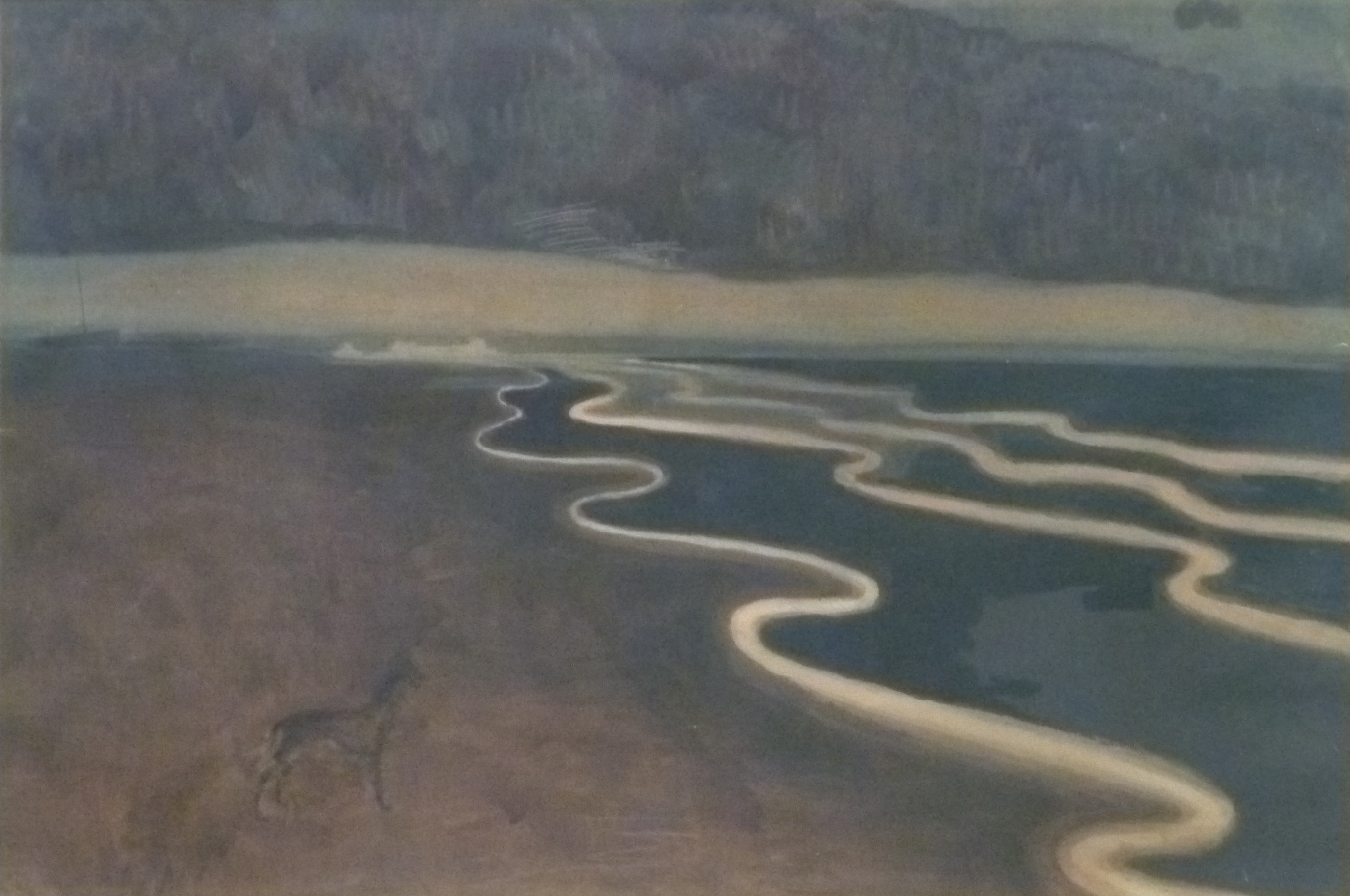 "Marine bij stormweer" (1909), gewassen Oost-Indische inkt, penseel, aquarel, gouache en kleurpotlood op papier (473 x 720 mm) door de Belgische kunstenaar Léon Spilliaert; privébezit